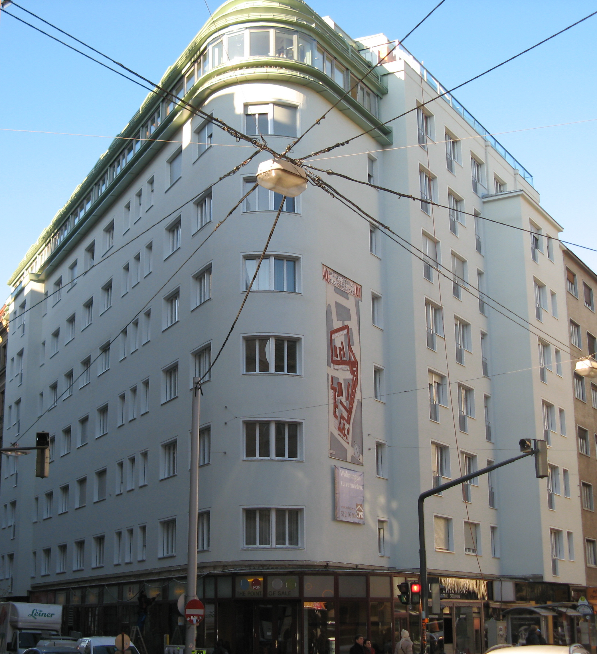 Operngasse 36 (1937), Wien-Wieden